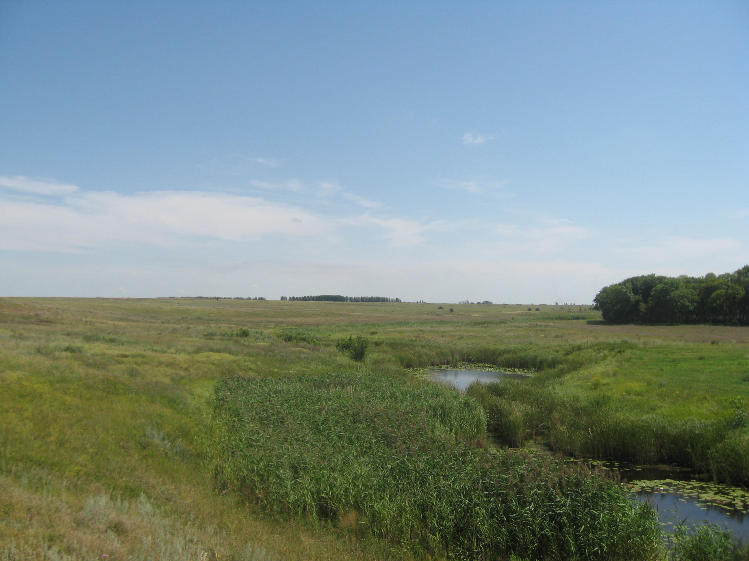 Видна река.